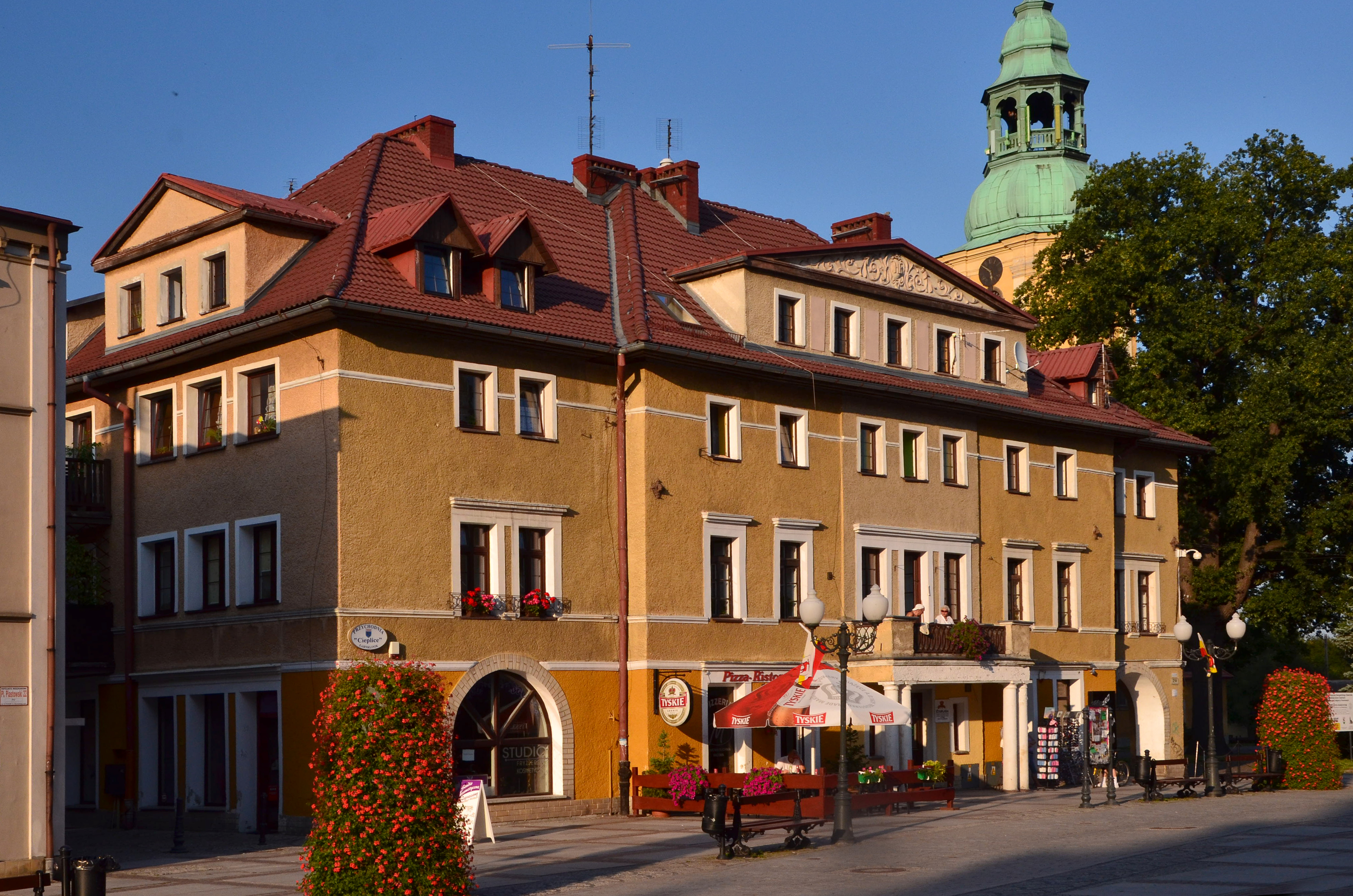 Dawny Hotel Pruski - Preussenhof przy pl. Piastowski 20. Miasto Jelenia Góra-Cieplice.